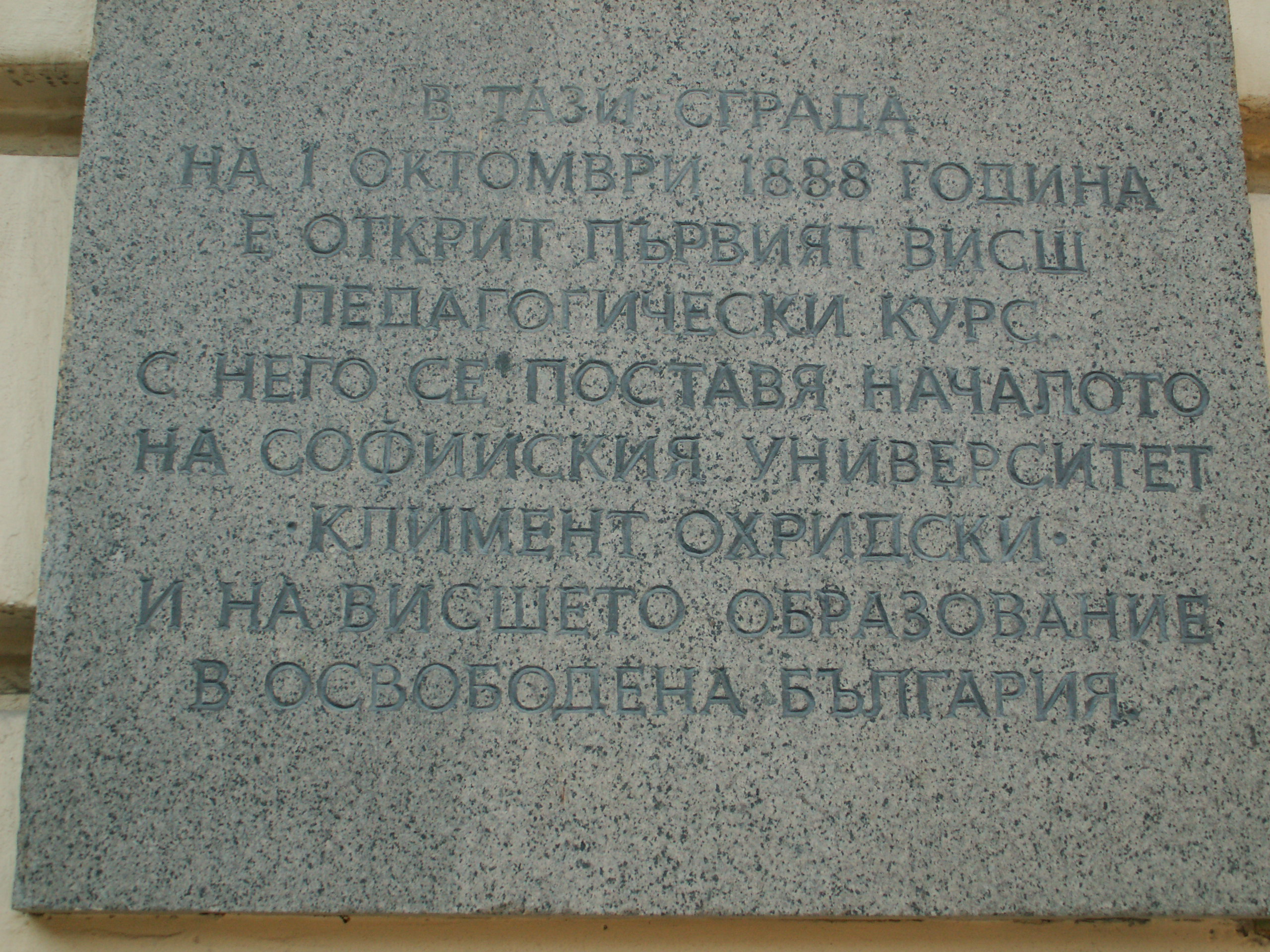 Plaque sur la façade de la faculté de journalisme et de communication de masse de l'université de Sofia, commémorant les premiers cours de l'établissement en 1888